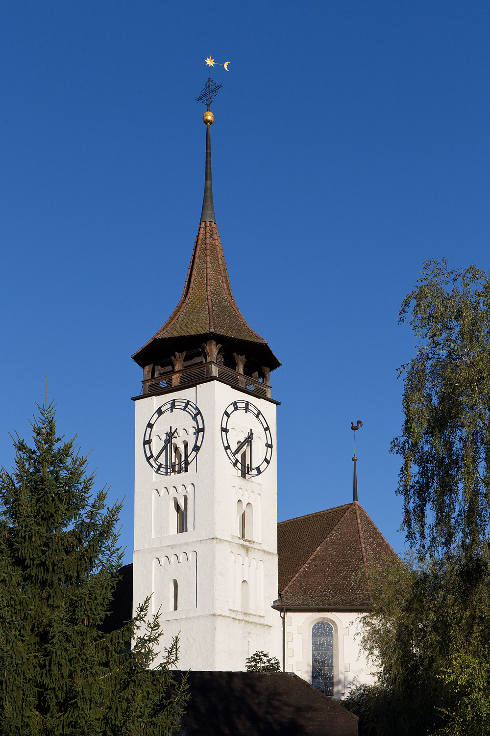 Dorfkirche von Steffisburg